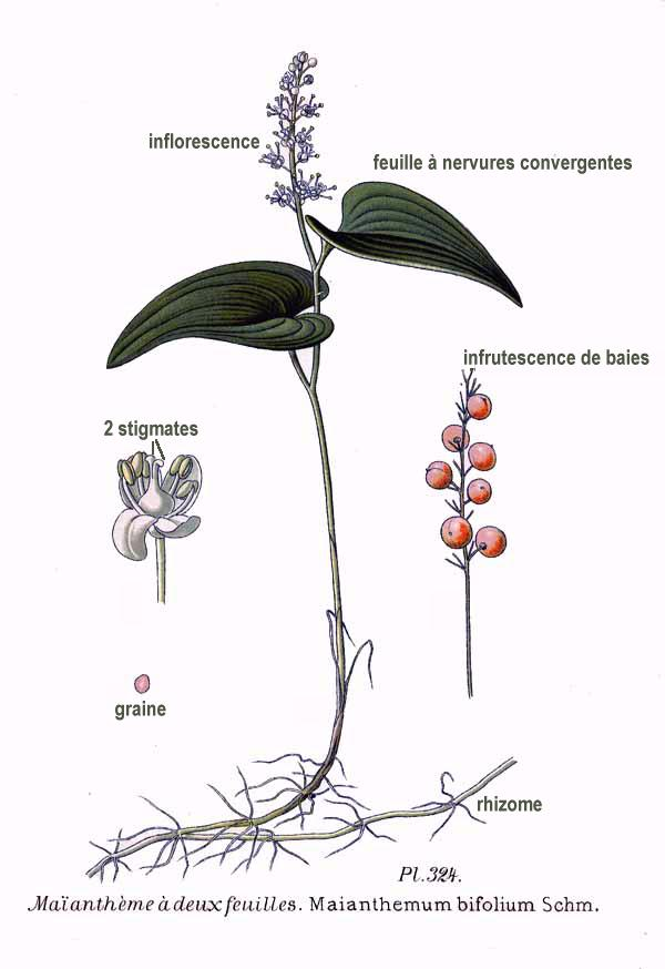 Maianthemum bifolium Schm.